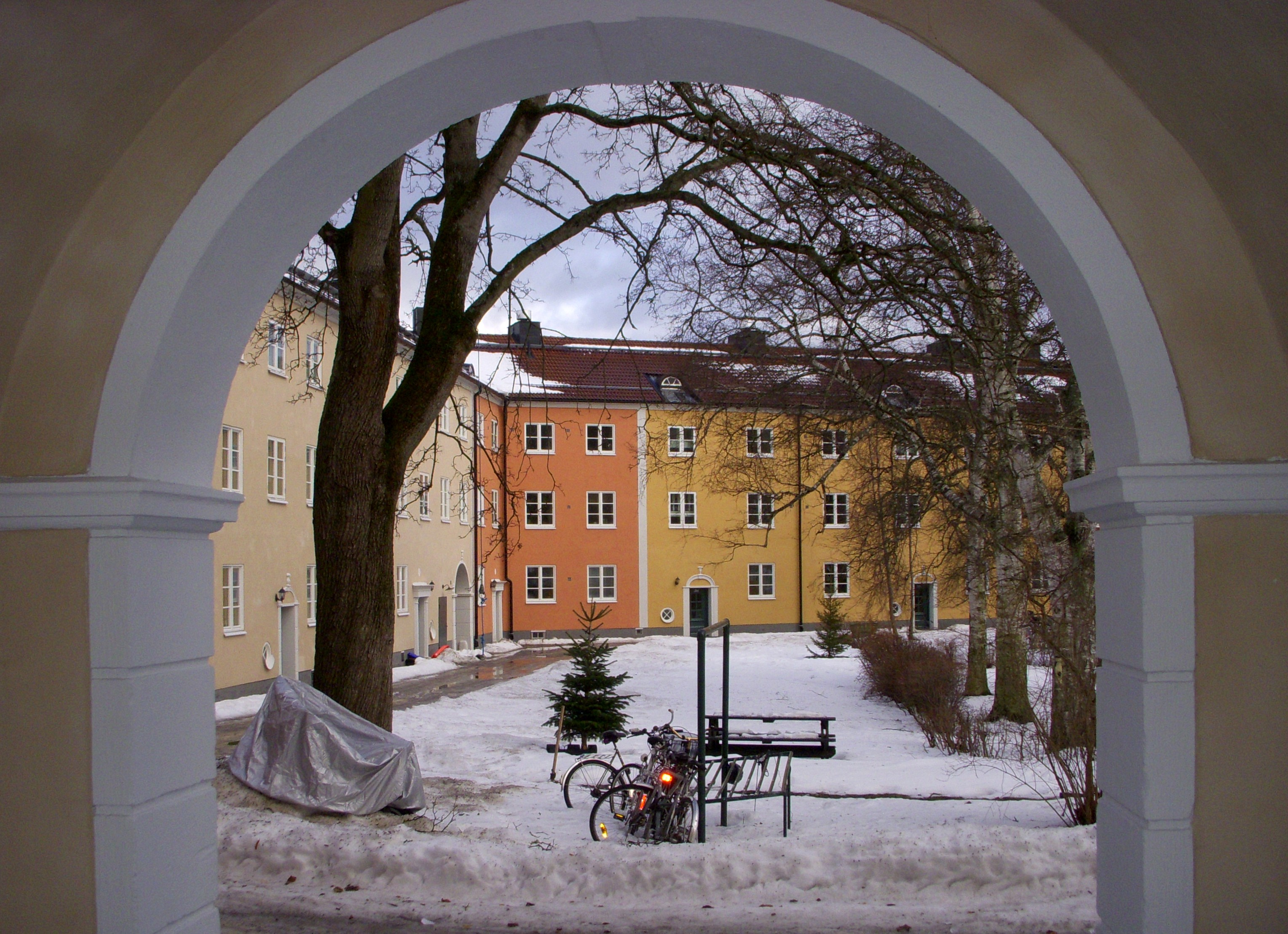 Enskedegård, kvarteret Tröskverket, innergården